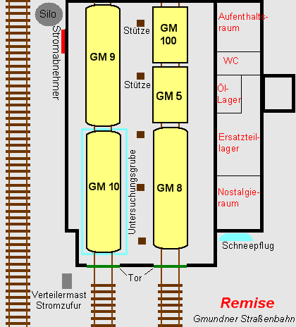 Plan der Remise der Straßenbahn Gmunden